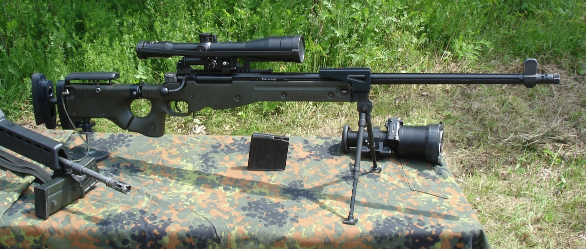 G22 mit Zielfernrohr mit aufgeschraubtem Mündungsaufsatz mit Notkorn. Verstellmöglichkeiten der Schulterstütze sind maximal ausgezogen. Gut zu erkennen der Erdsporn in der Schulterstütze. Rechts der Restlichtverstärker Nachtsichtvorsatz 80 (NSV80).